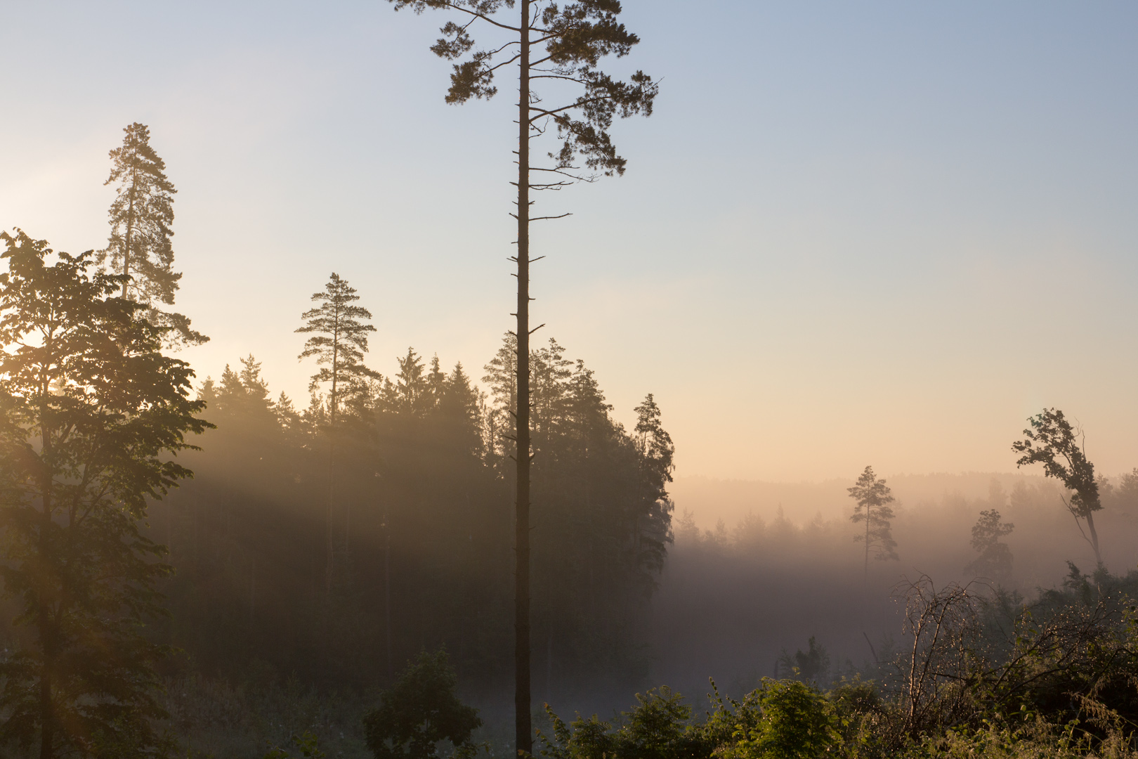 Bubių-Padubysio miškai (Paraudžių miškas)